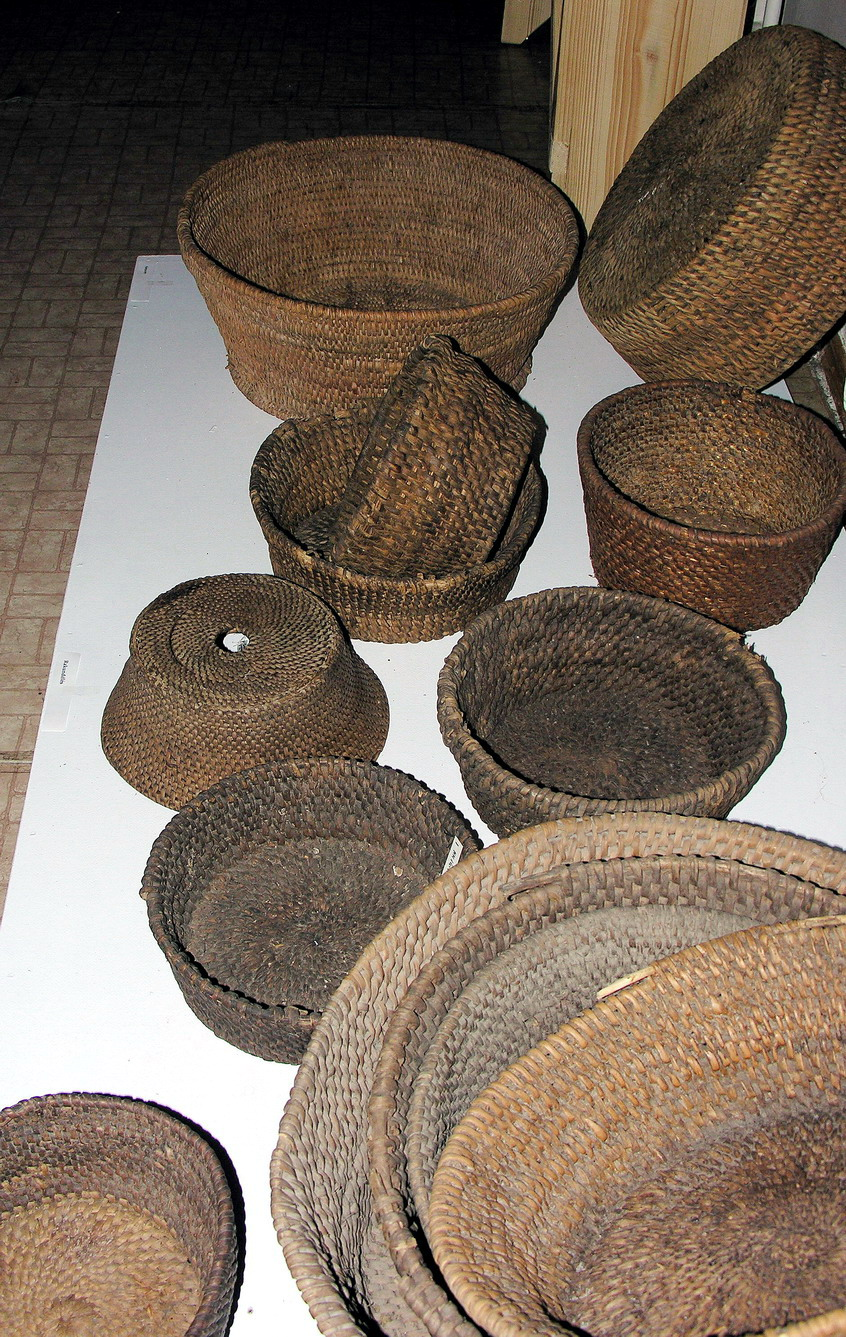 Žemaitėška: Sietovės, 2006-11-21, Žemaitėjė